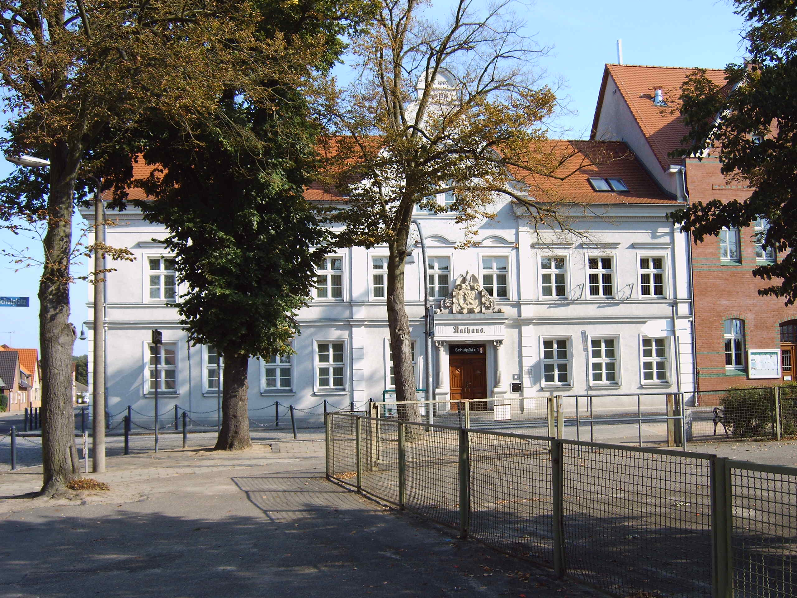 Rathaus in Klötze